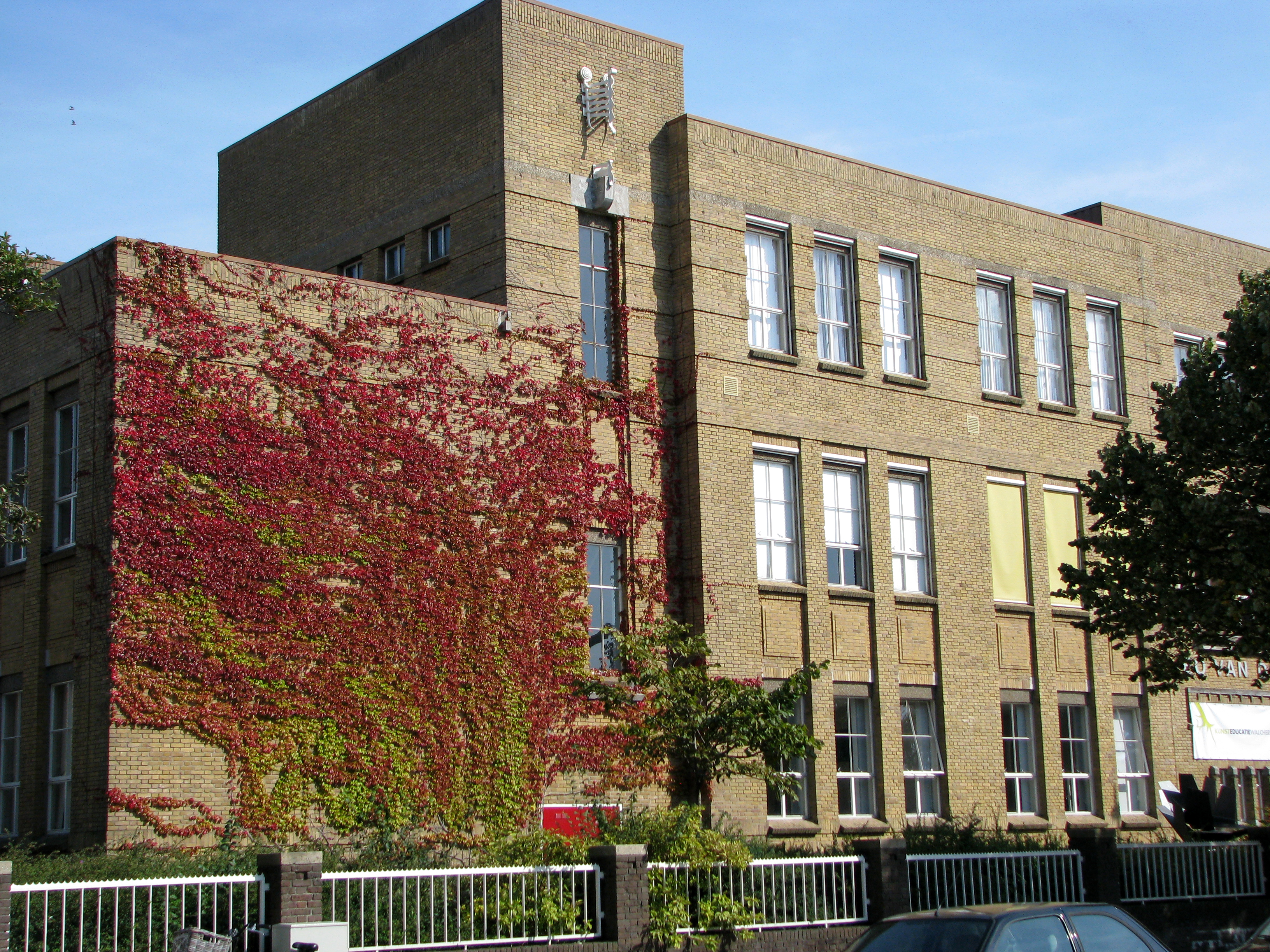 Vlissingen, Brouwenaarstraat 2, voormalige Rijks HBS, thans cultureel centrum.